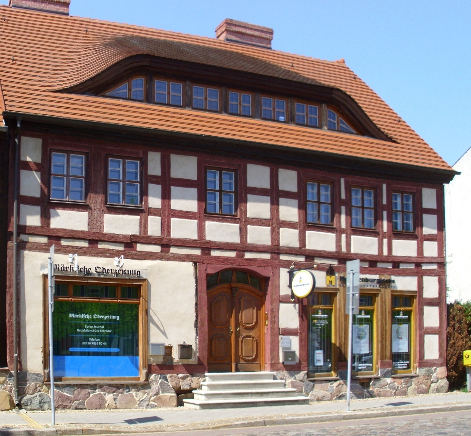 Eines der ältesten erhaltenen Gebäude in Storkow, nach dem Stadtbrand von 1712 errichtet, ab 1994 restauriert